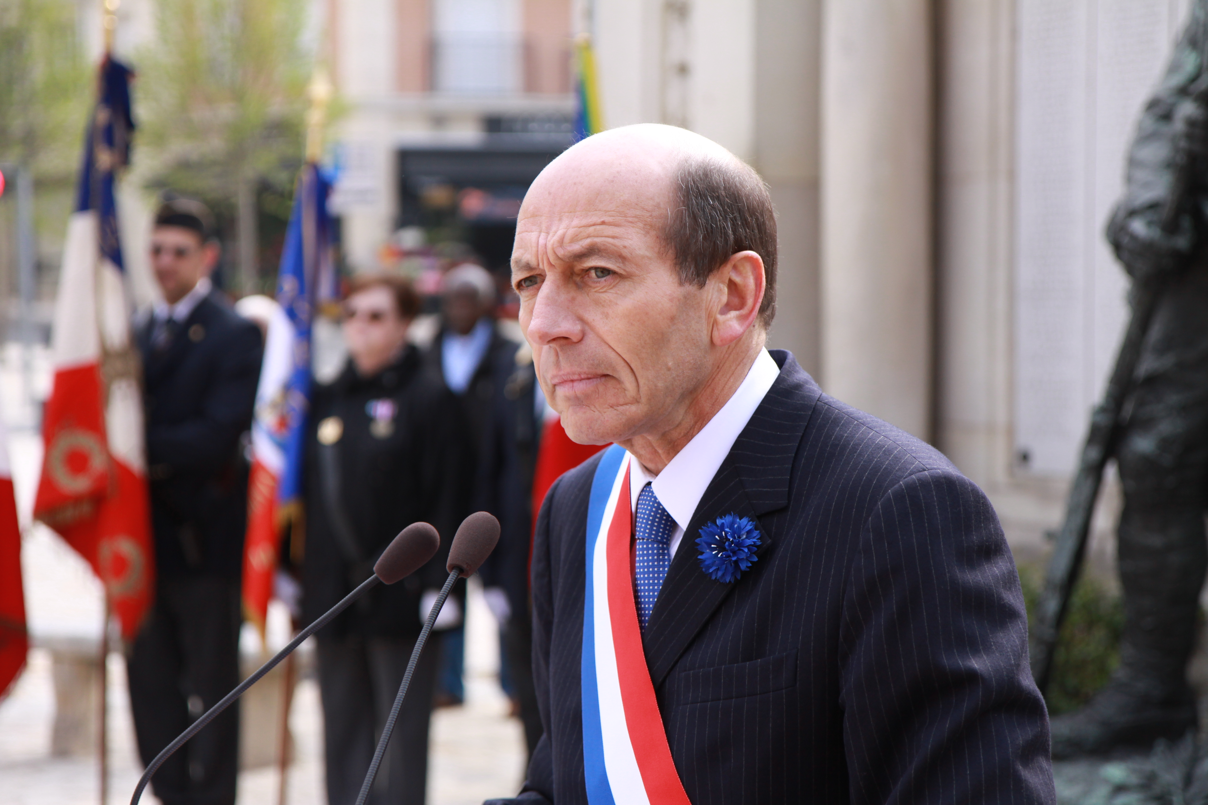 Cérémonie du 8 mai à Maisons-Alfort devant la mairie.